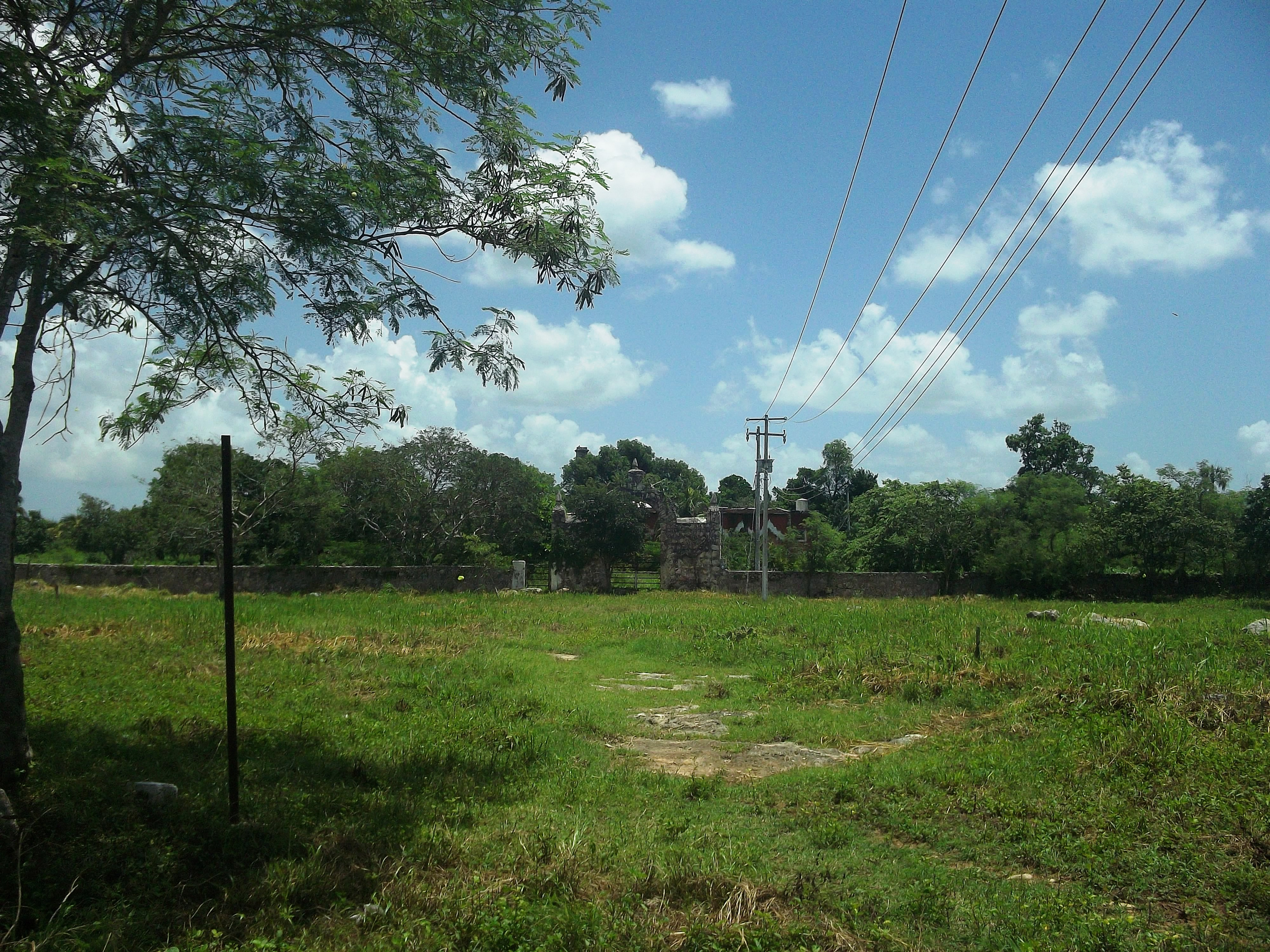 Vistade la hacienda de Sakolá, Yucatán.